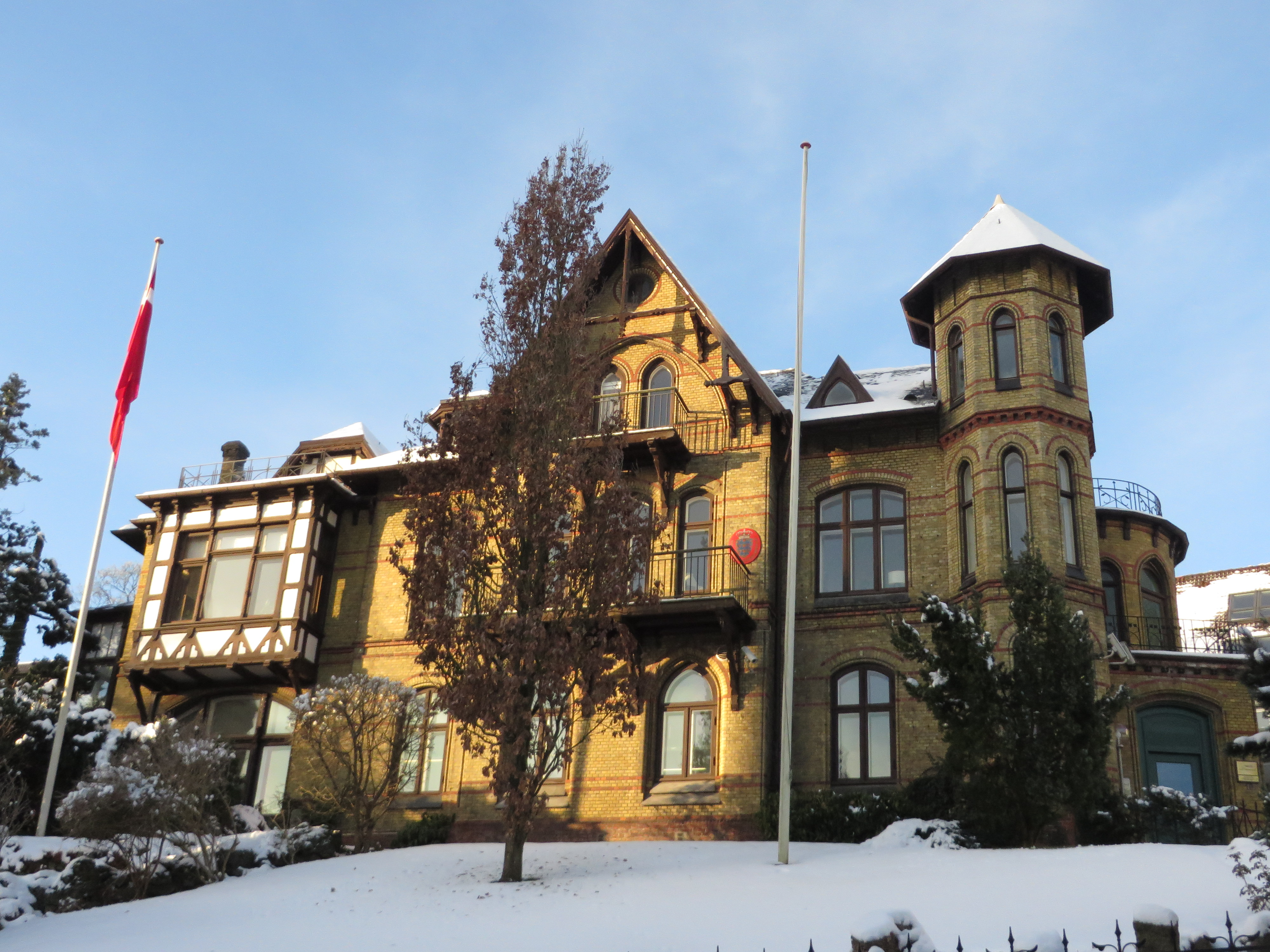 Burg Schöneck (Flensburg, Februar 2014), Bild 07